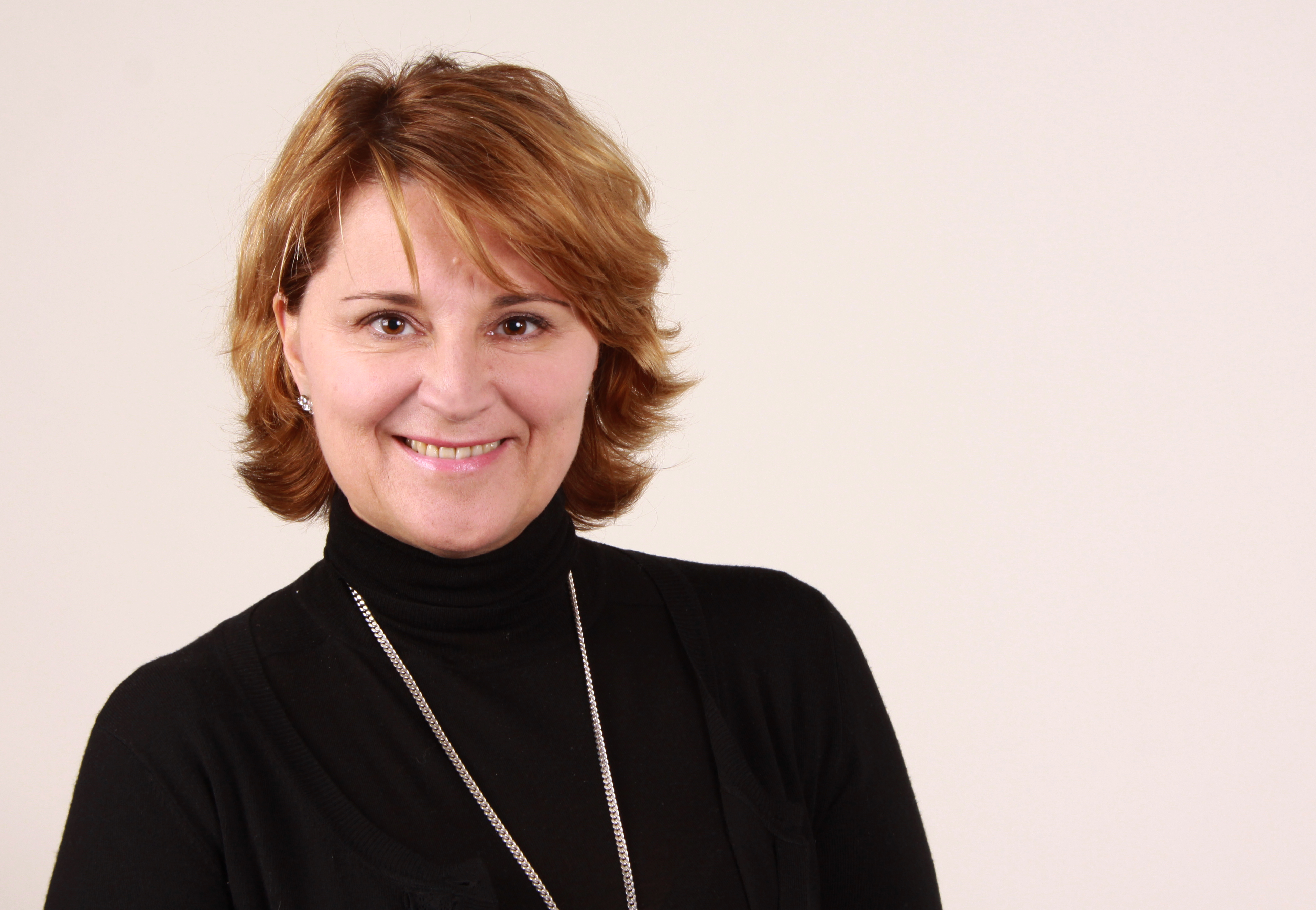 Abgeordnete/r Europaparlament